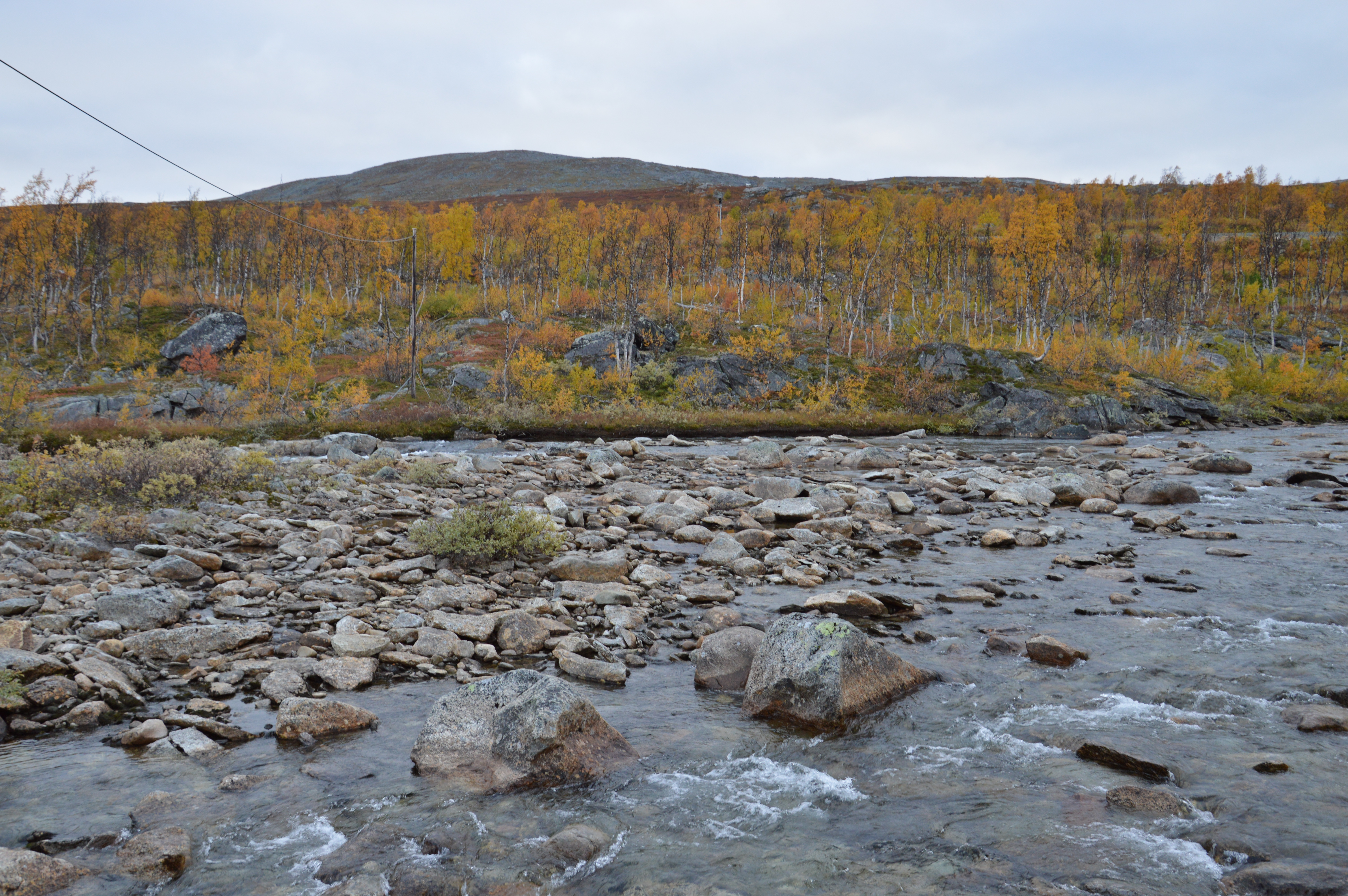 Gubbeltåga i nærheten av bomstasjonen like nord for brua i Stokkalia, den 25. september 2012